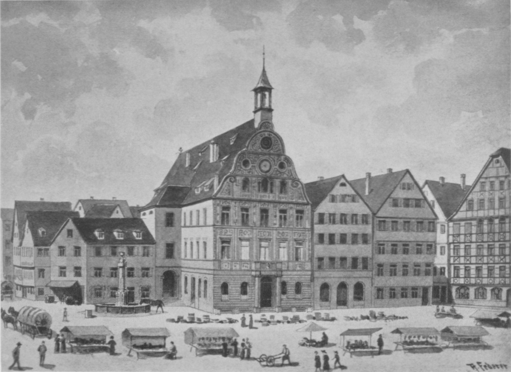 Stuttgart, Altes Rathaus. Links davon „Herberge der Kürschnerzunft“.